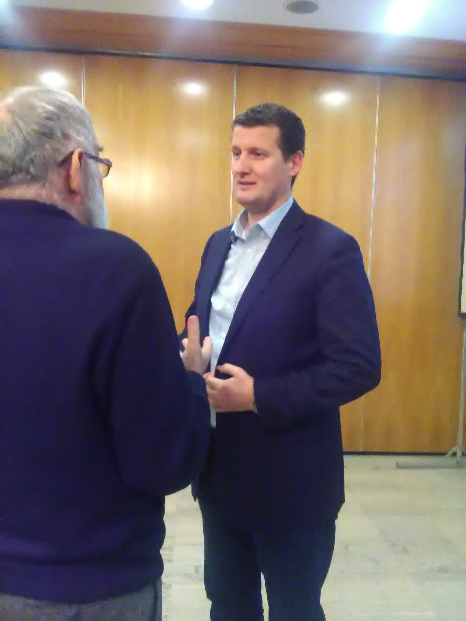 Senad Šepić